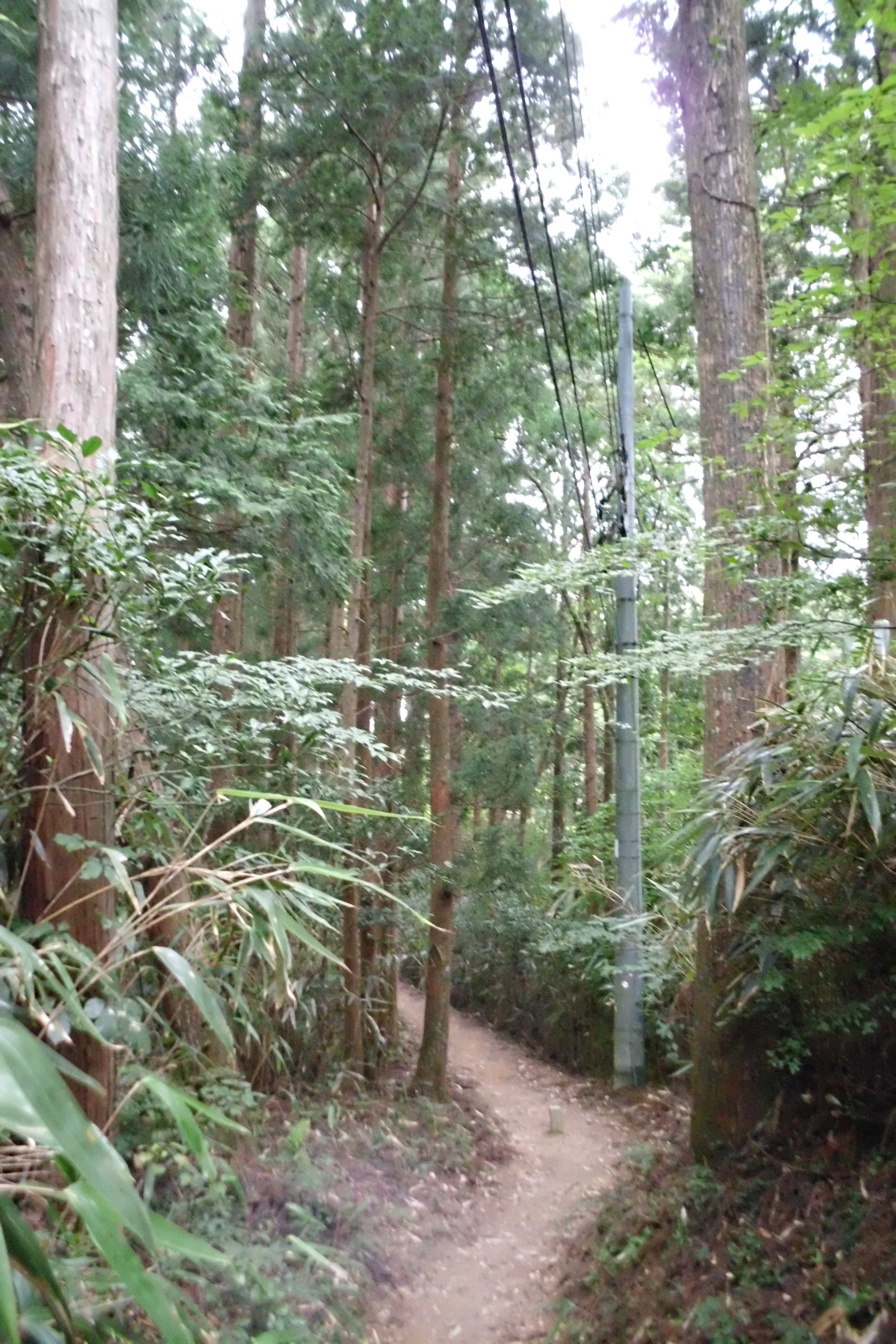 2016年に世界遺産「紀伊山地の霊場と参詣道」に「高野参詣道」として追加登録された女人道（にょにんみち）